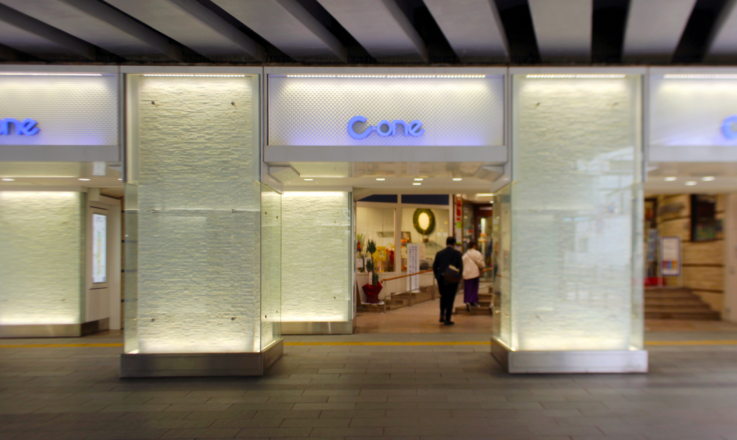 千葉駅高架下にある商業施設 シーワン（C-one）